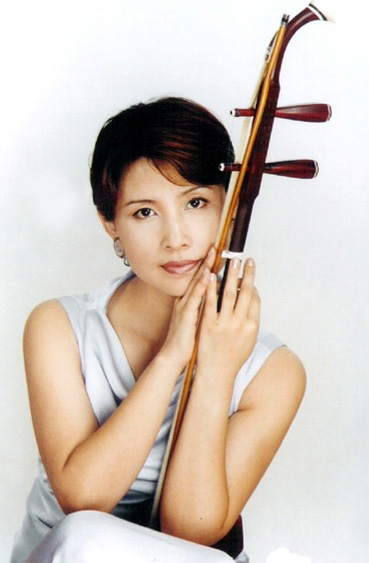 Xiaohui Ma